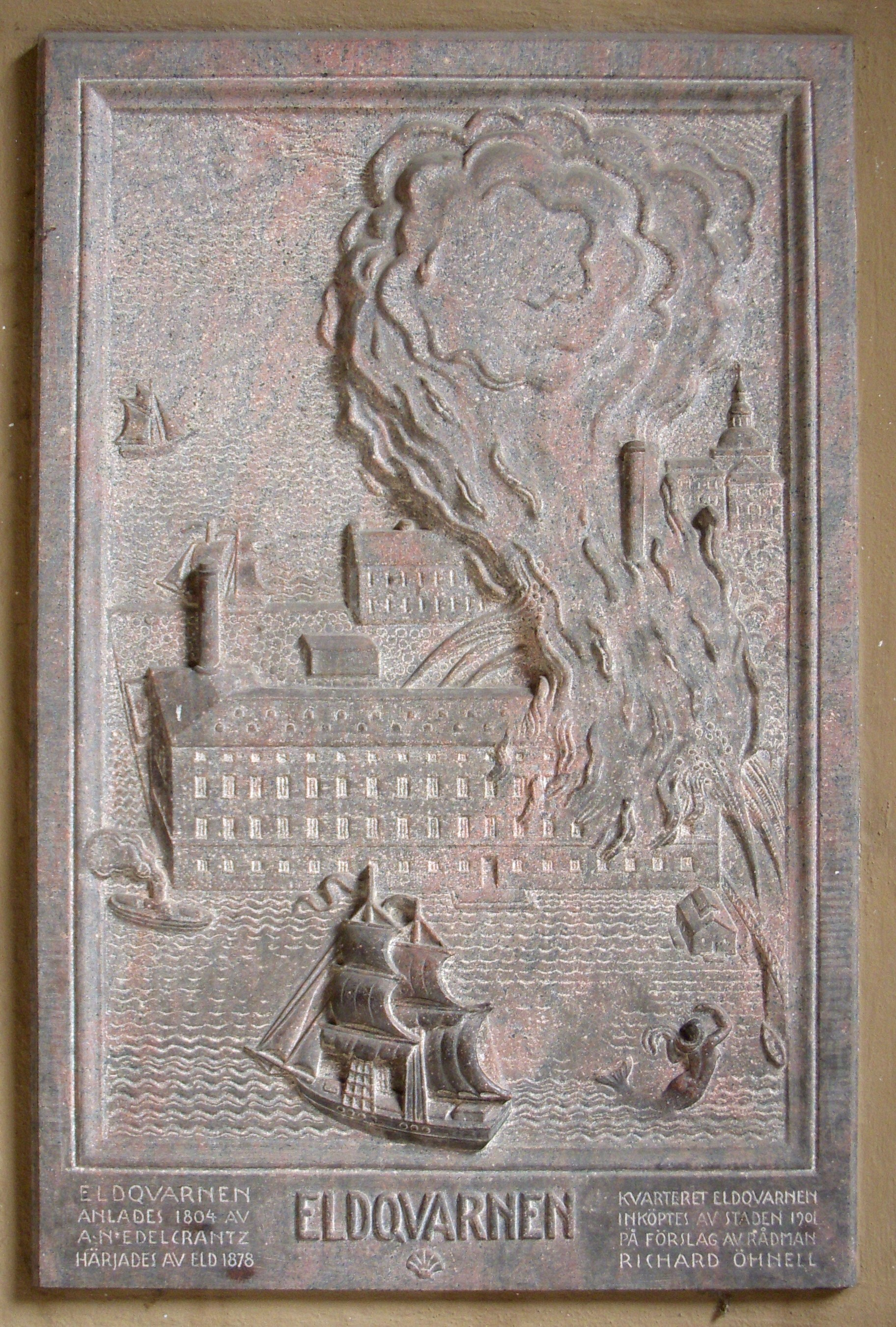 Minnesrelief om "Eldquarnen" i Stockholms stadshusets portal